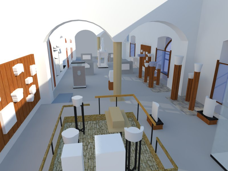 scorcio della sala